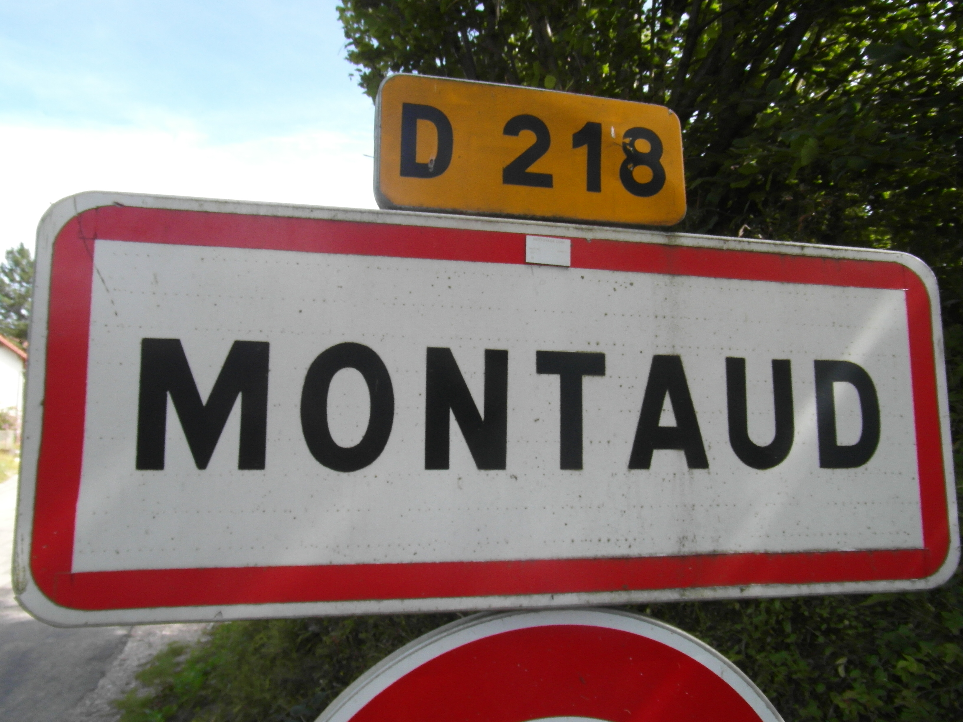 Panneau entrée Montaud (D28)